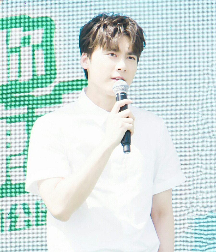 【2017.6.10康师傅绿茶活动】 (李易峰)